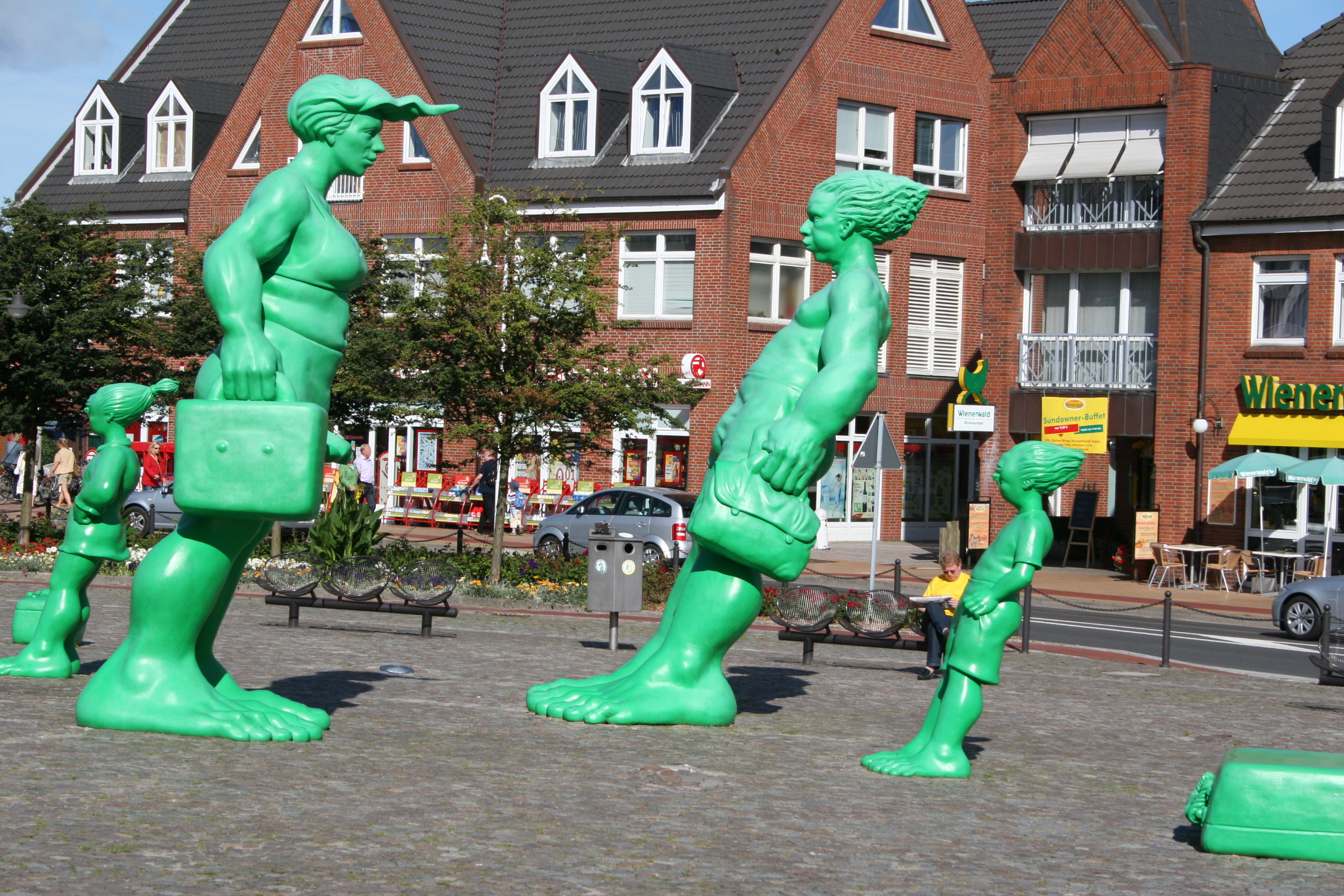 Skulpturen "Reisende im Wind" Martin Wolke in Westerland Sylt Germany